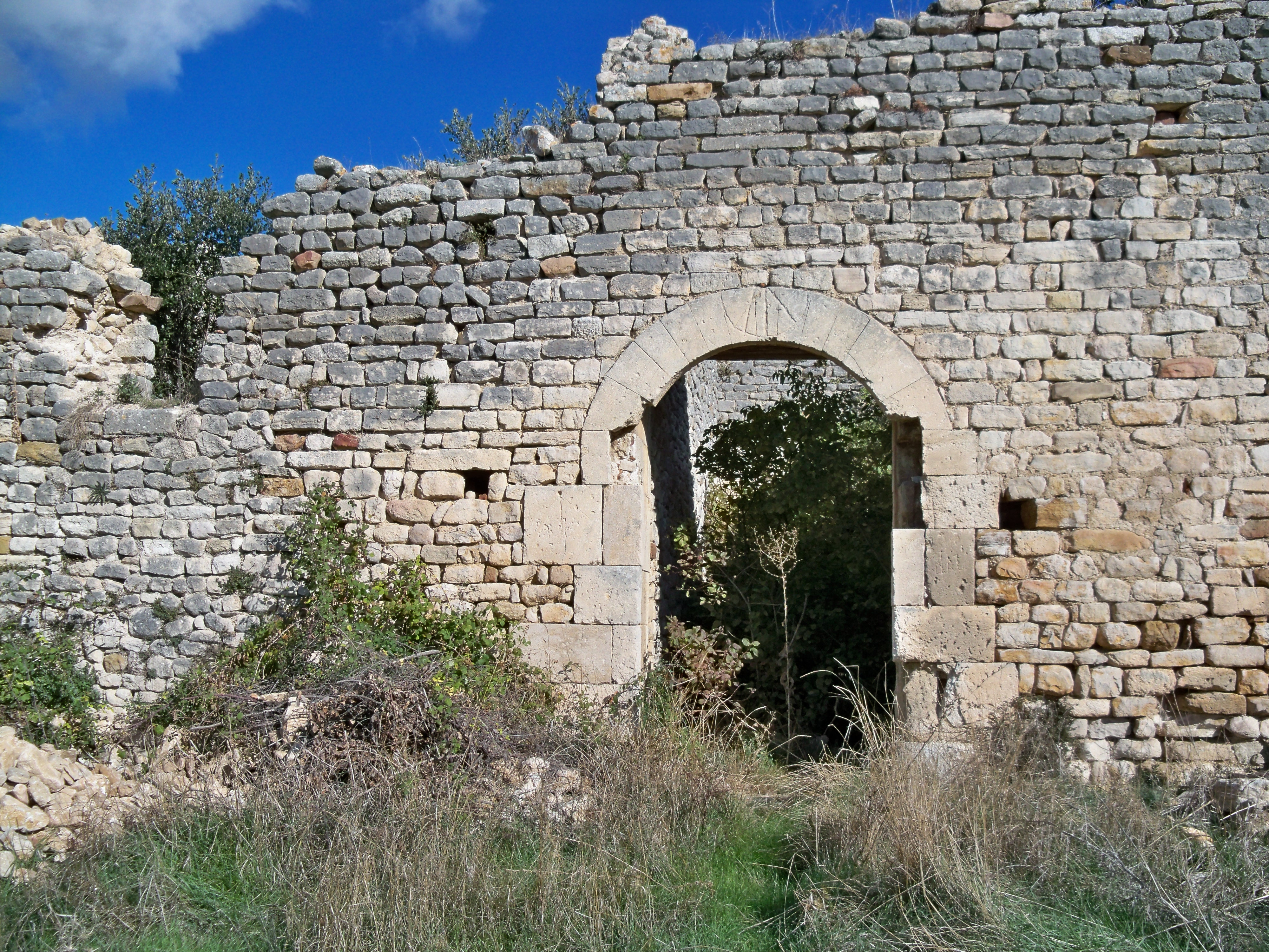 Entrée du Prieuré Saint Julien, Rustrel Vaucluse, France